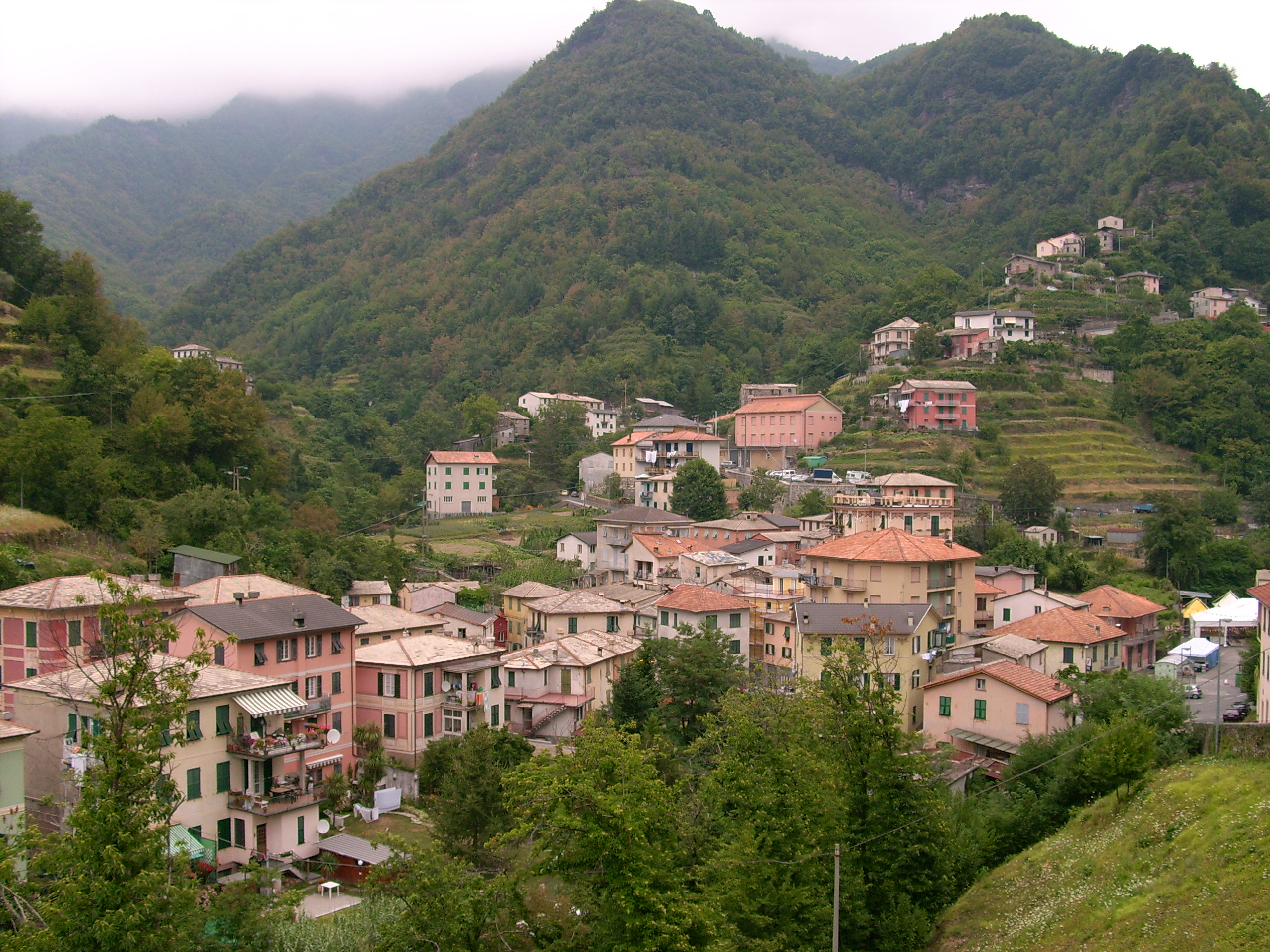 Panorama di Favale di Malvaro, Liguria, Italia